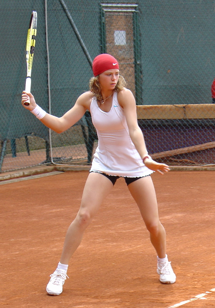 La sedicenne tennista italoargentina